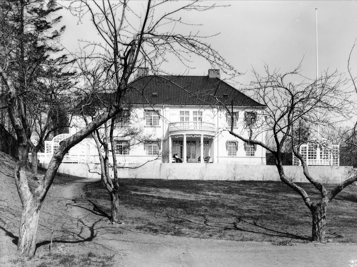 Professor Dahls gate 26 fra hagesiden. Foto: Anders Beer Wilse (ca. 1920). Fra Byhistorisk samling hos Oslo Museum.